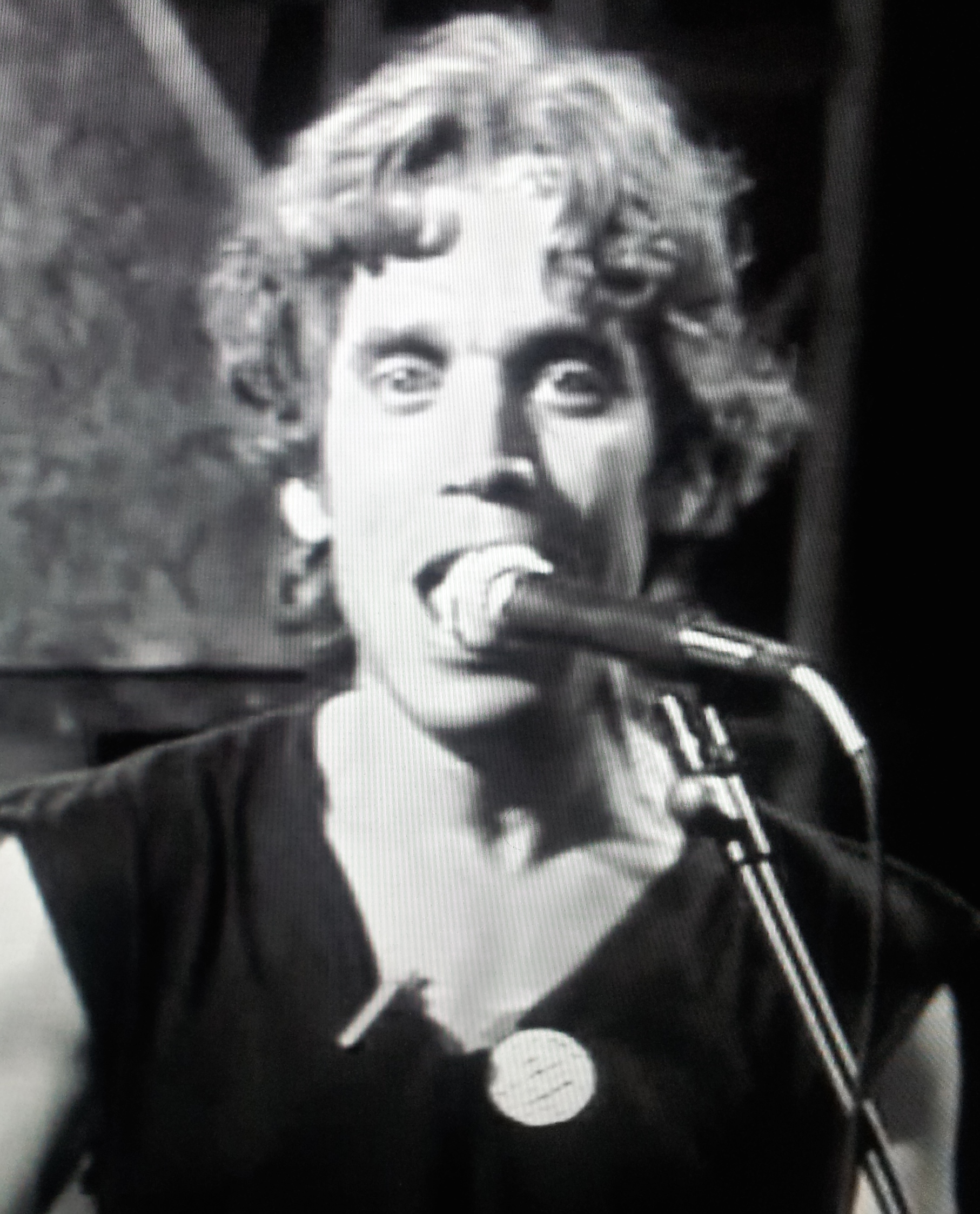 Djamel Sabri, chanteur algérien d'expression chaoui.